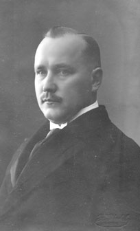 Peeter Kõpp, eesti põllumajandusteadlane